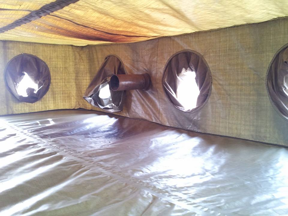 Widok wewnątrz komory grupowej KG-12